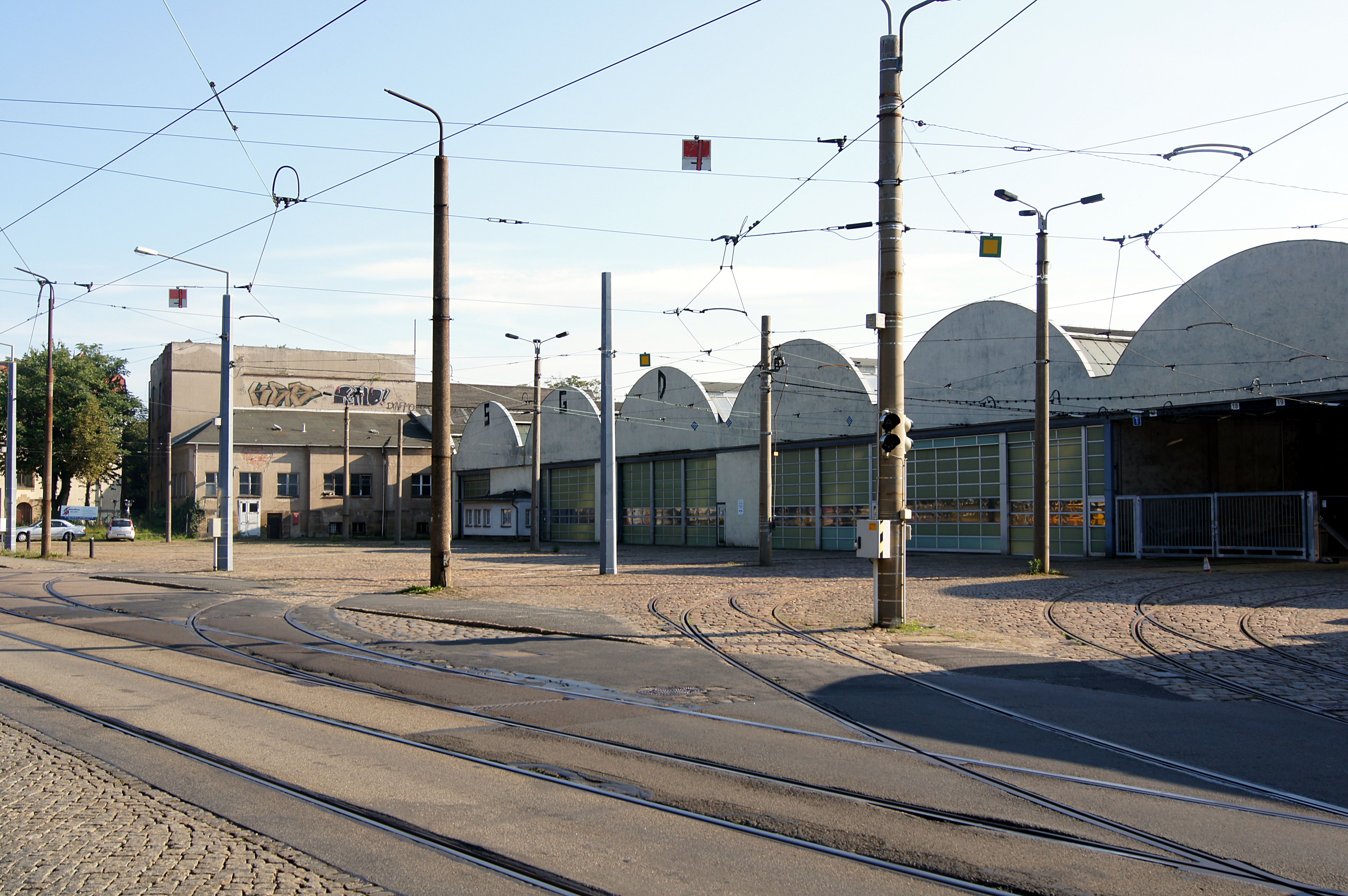 Betriebshof Tolkewitz, von der Wehlener Straße aus.